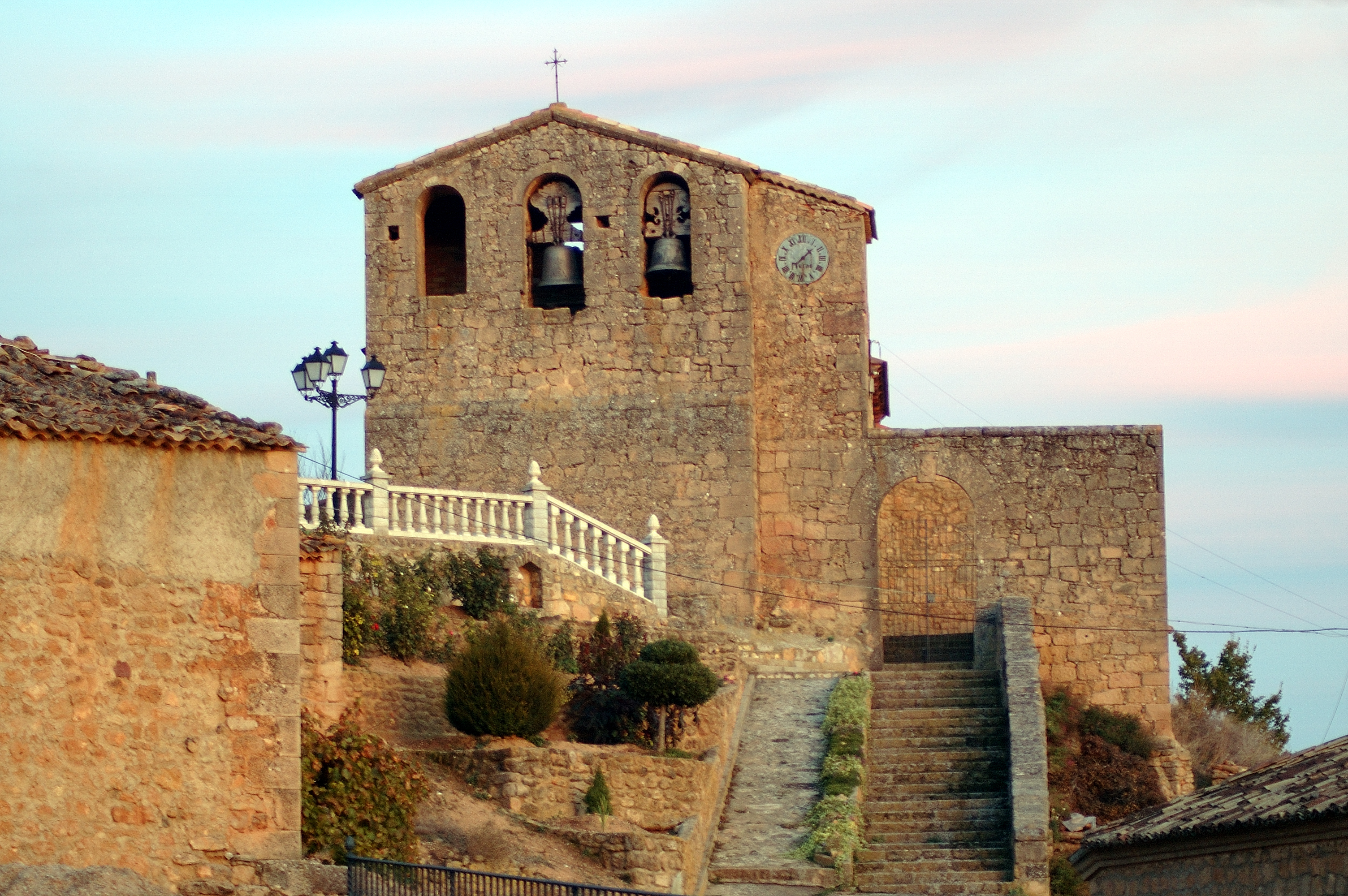 Iglesia